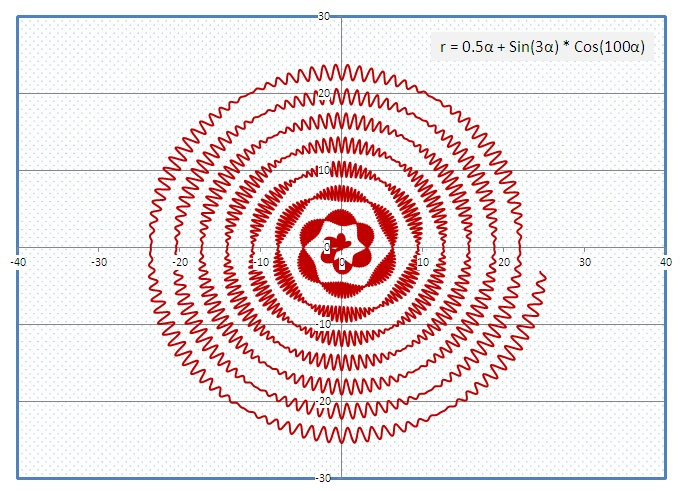 r = 0.5α + Sin(3α) * Cos(100α